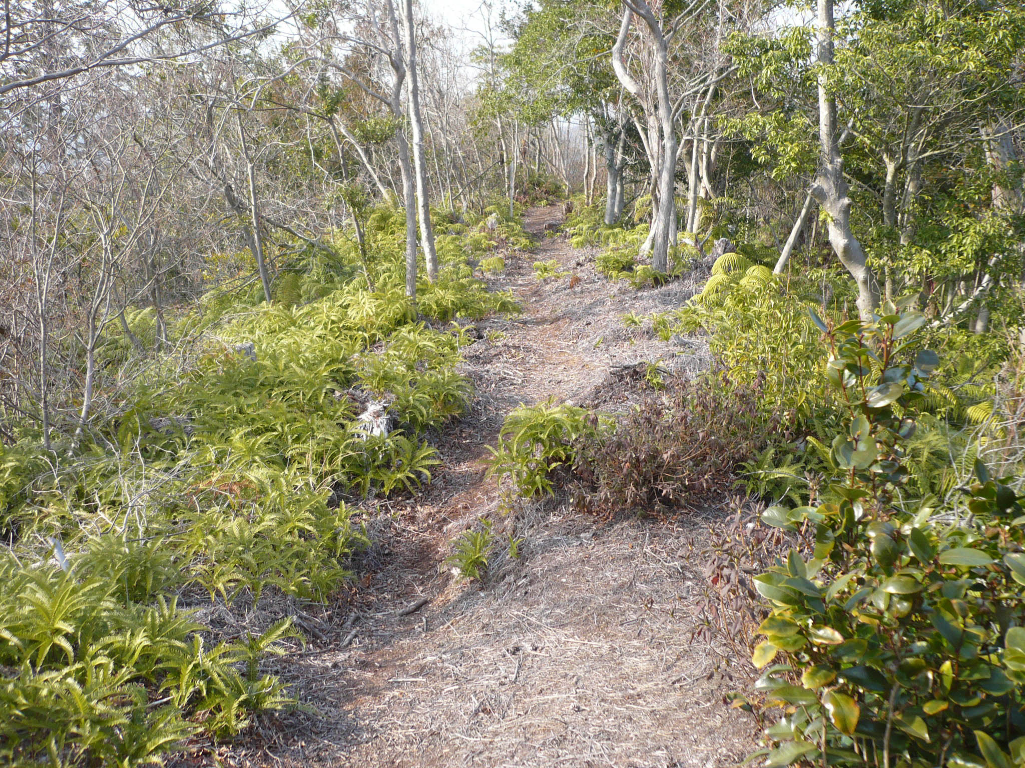 小倉丸跡